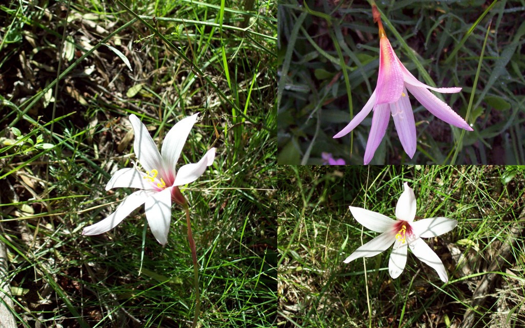 Zephyranthes versicolor. Amaryllidaceae. Fotos tomadas en el bosque ribereño al margen del Río Negro en Palmar, departamento de Soriano, Uruguay